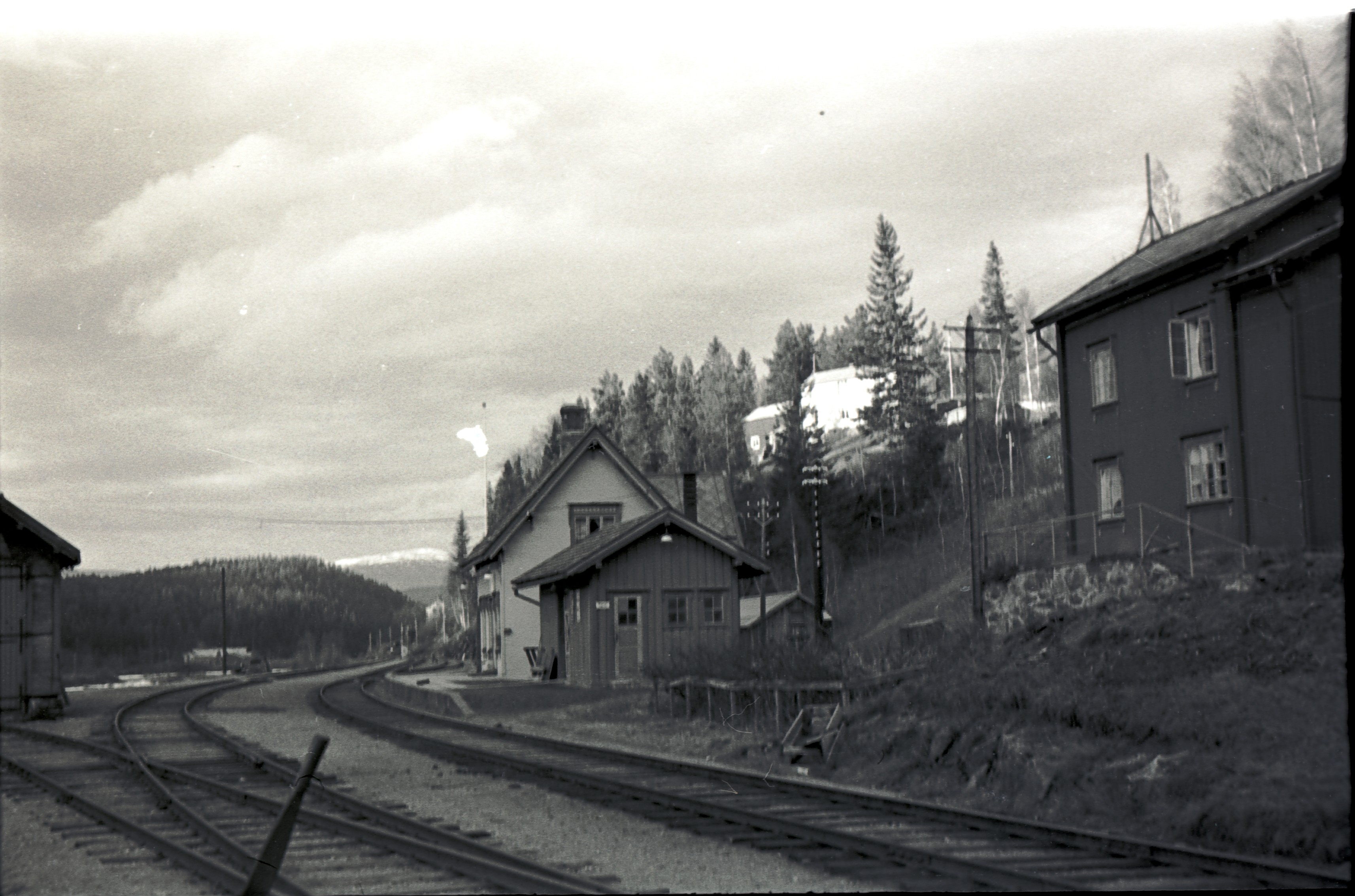 Langlete stasjon, 14. november 1945. Foto: Kåre A. Jørgenvaag/NTNU UB. ID: J-073-6_01.